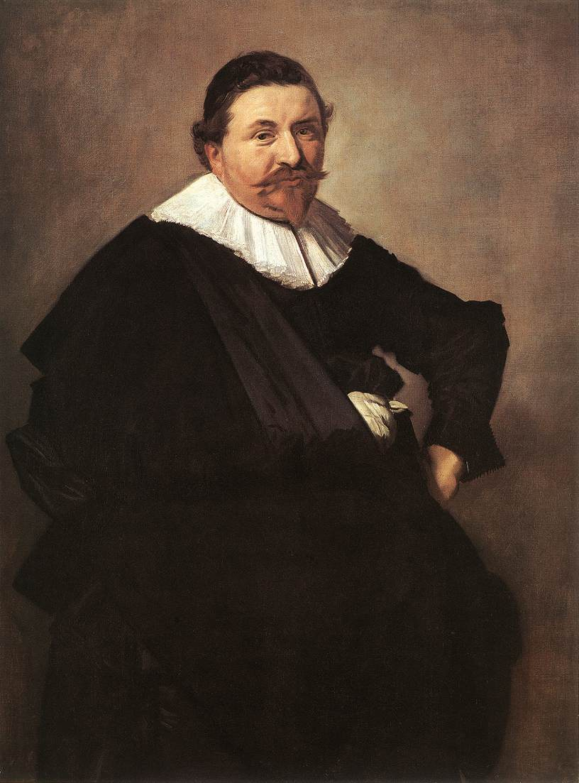 Portrait of Lucas de Clercq. Pendant of File:Frans Hals - Feyntje van Steenkiste.jpg.